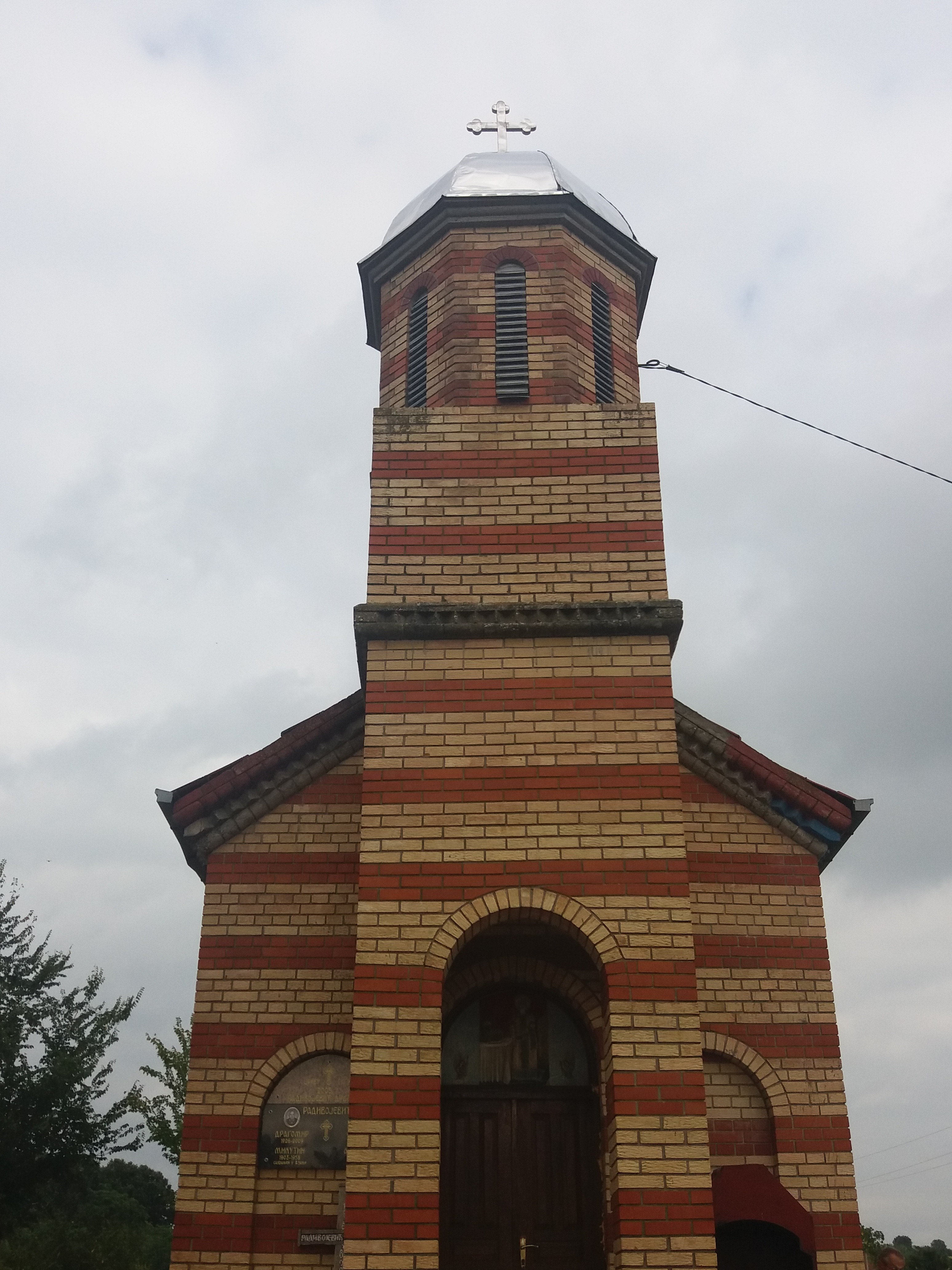 Crkva na seoskom groblju u Grčcu, Smederevska Palanka